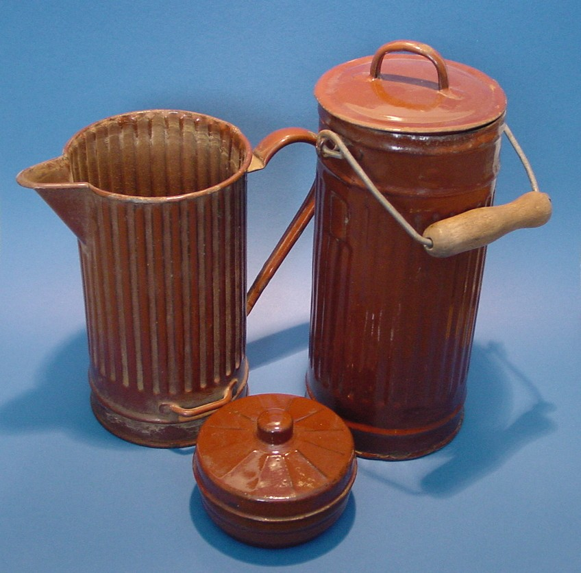 Bildbeschreibung: Henkelkanne, Kanne und Deckeldose aus alten Gasmaskenbüchsen Quelle: Sammlung MAT Fotograf/Zeichner: MAT Datum: 26.03.2006 Sonstiges